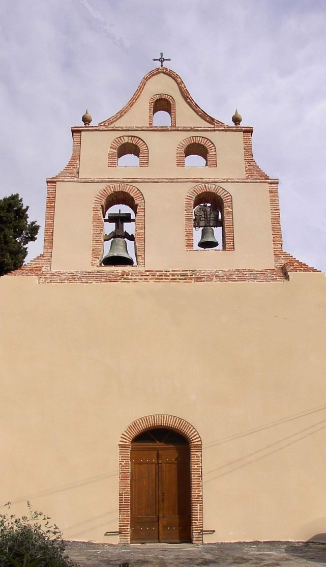 Fronton de l'église rénové en 2005